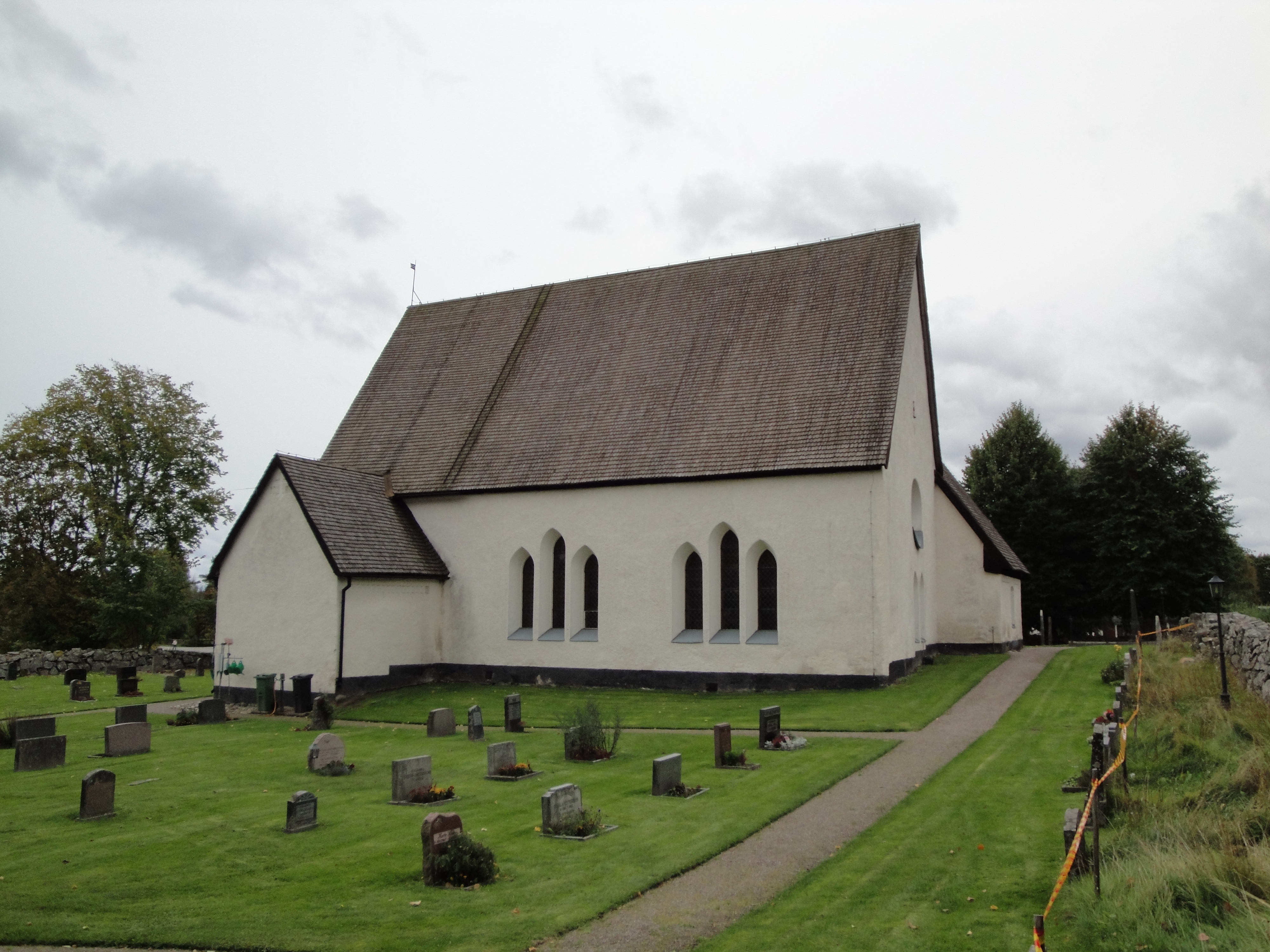 Riala kyrka i Norrtälje kommun.